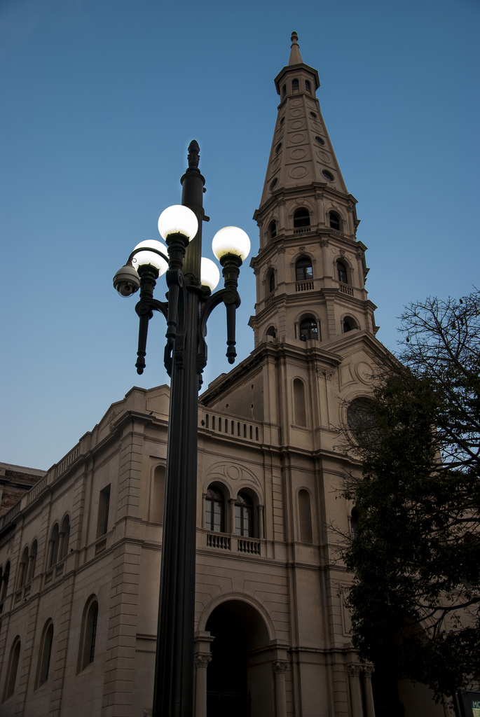 Iglesia San Francisco de Asís. Ubicada en el departamento de Montevideo